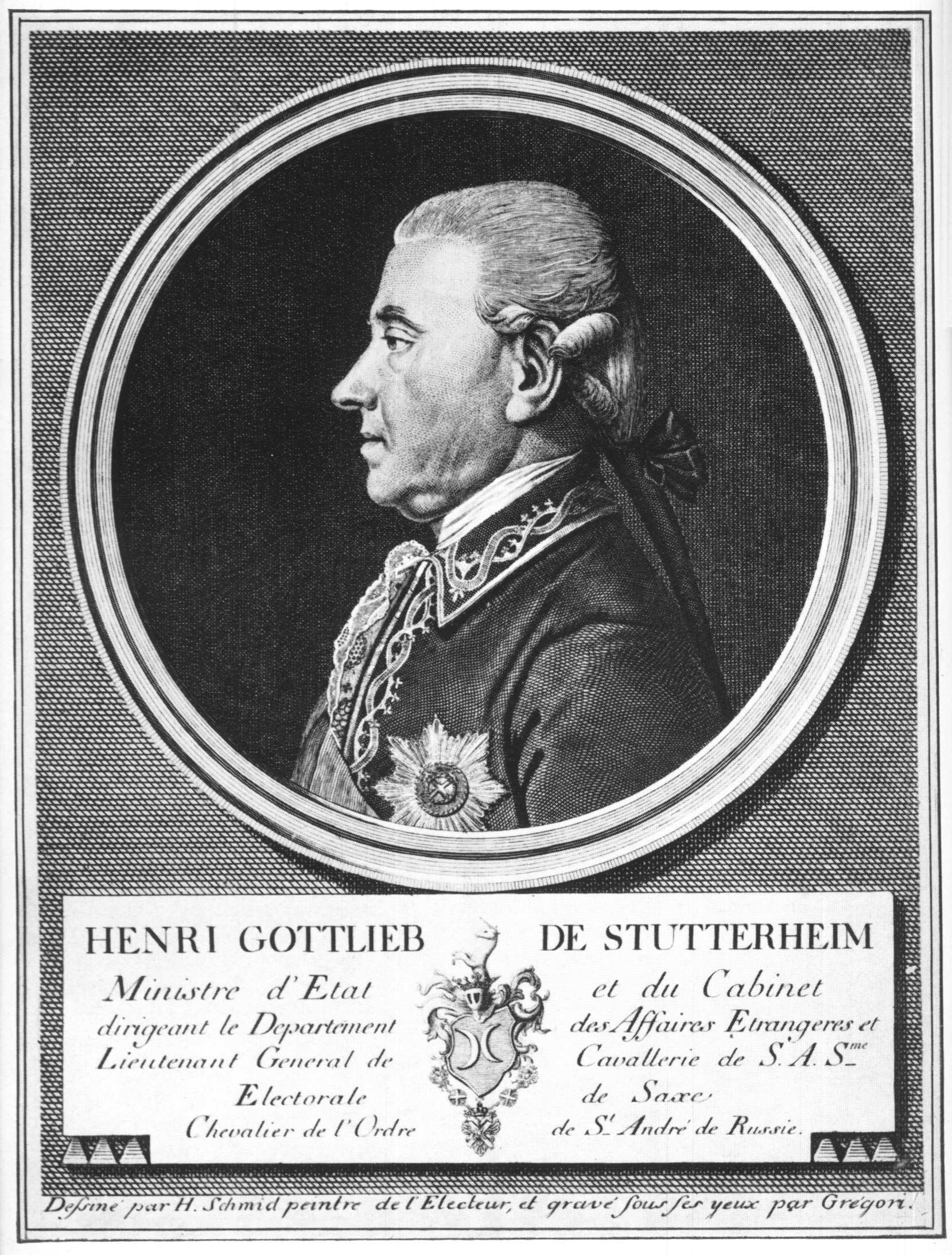 Heinrich Gottlieb von Stutterheim (22.12.1718-23.12.1789) kurs?chsischer Staats- und Kabinettsminister, Generalleutnant der Kavallerie